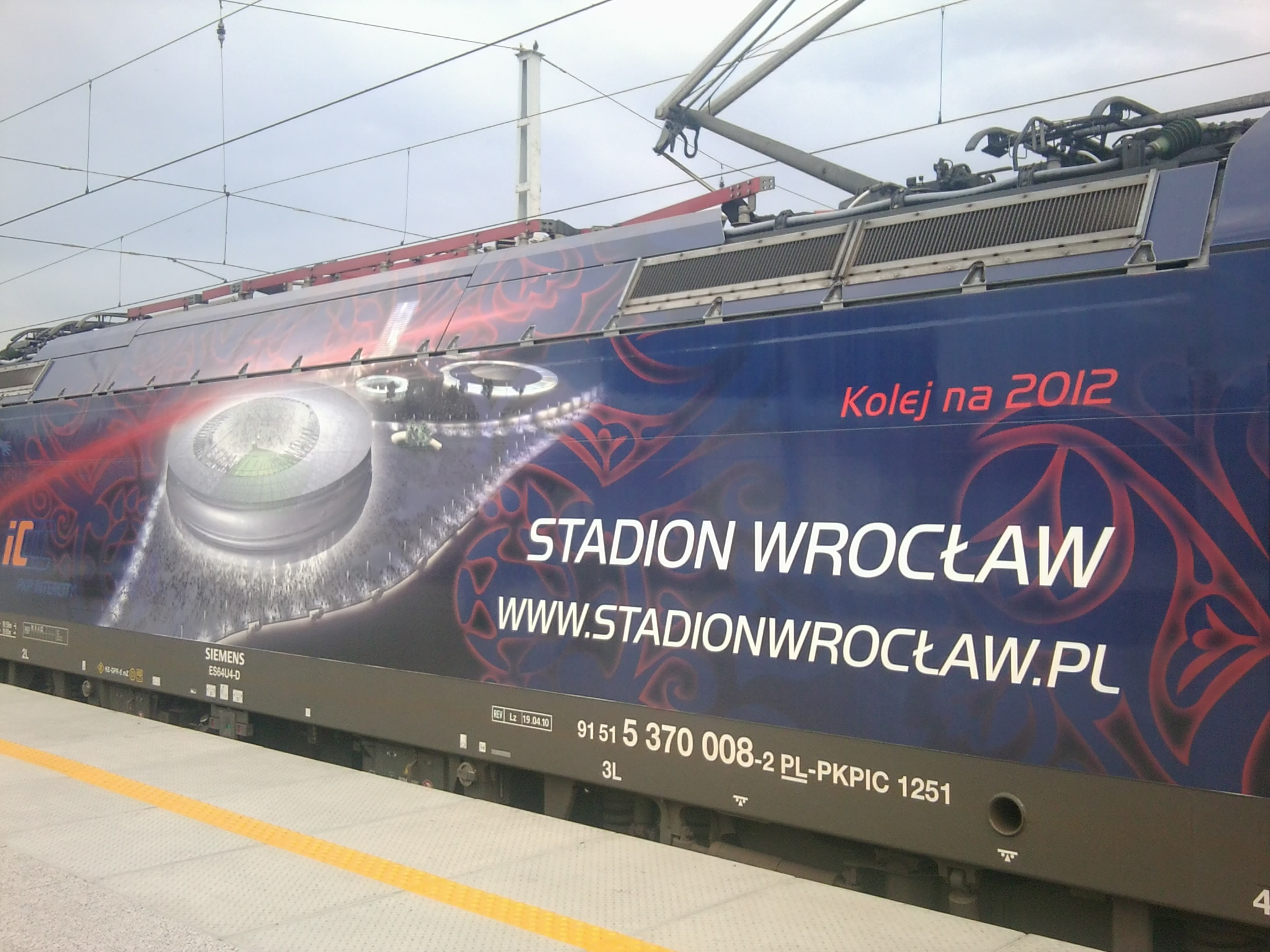 Jedna z polskich aren na których będą rozgrywane mecze EURO 2012, tu Stadion Miejski we Wrocławiu.